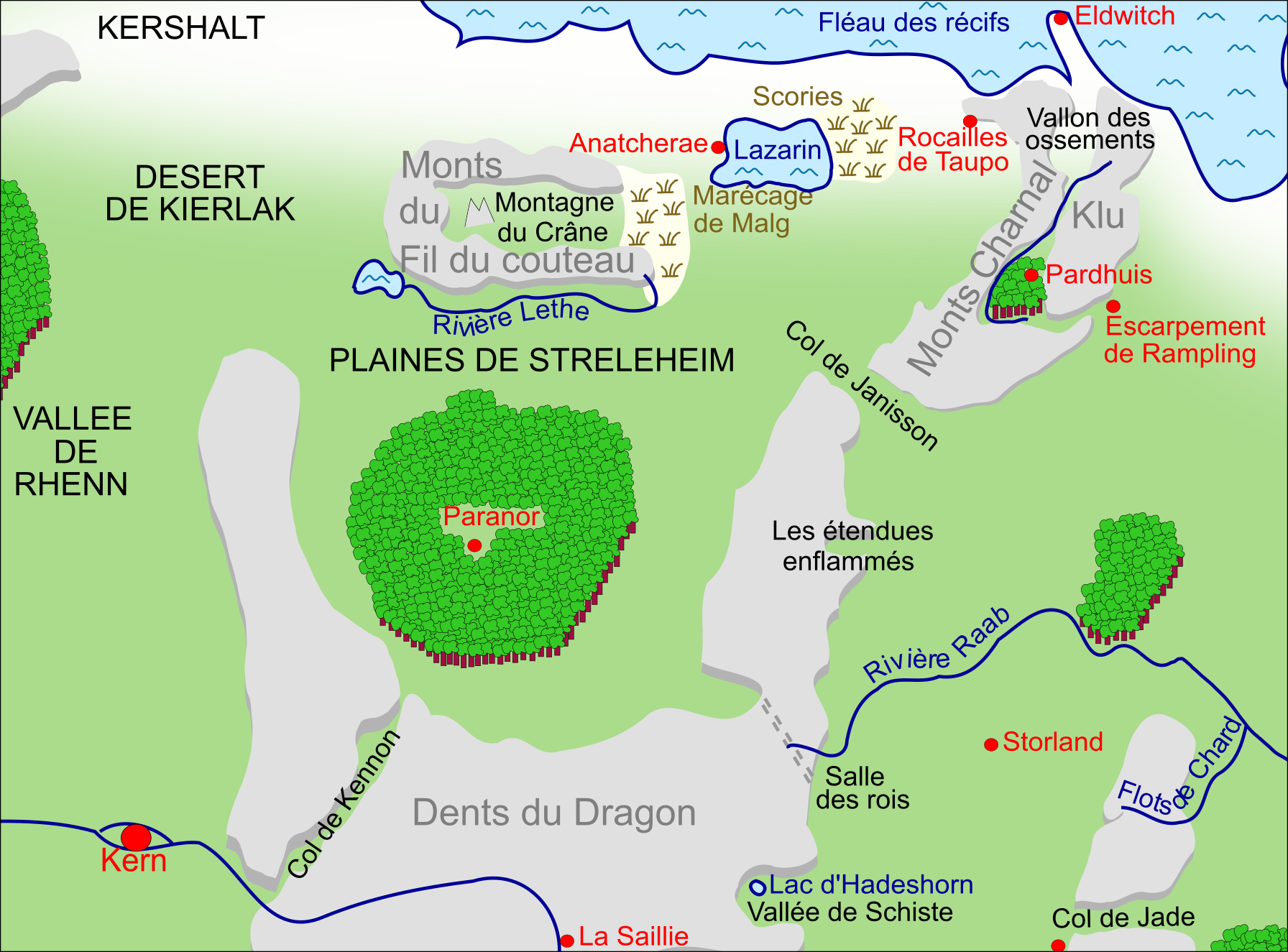 Terres du Nord version 2 - Shannara